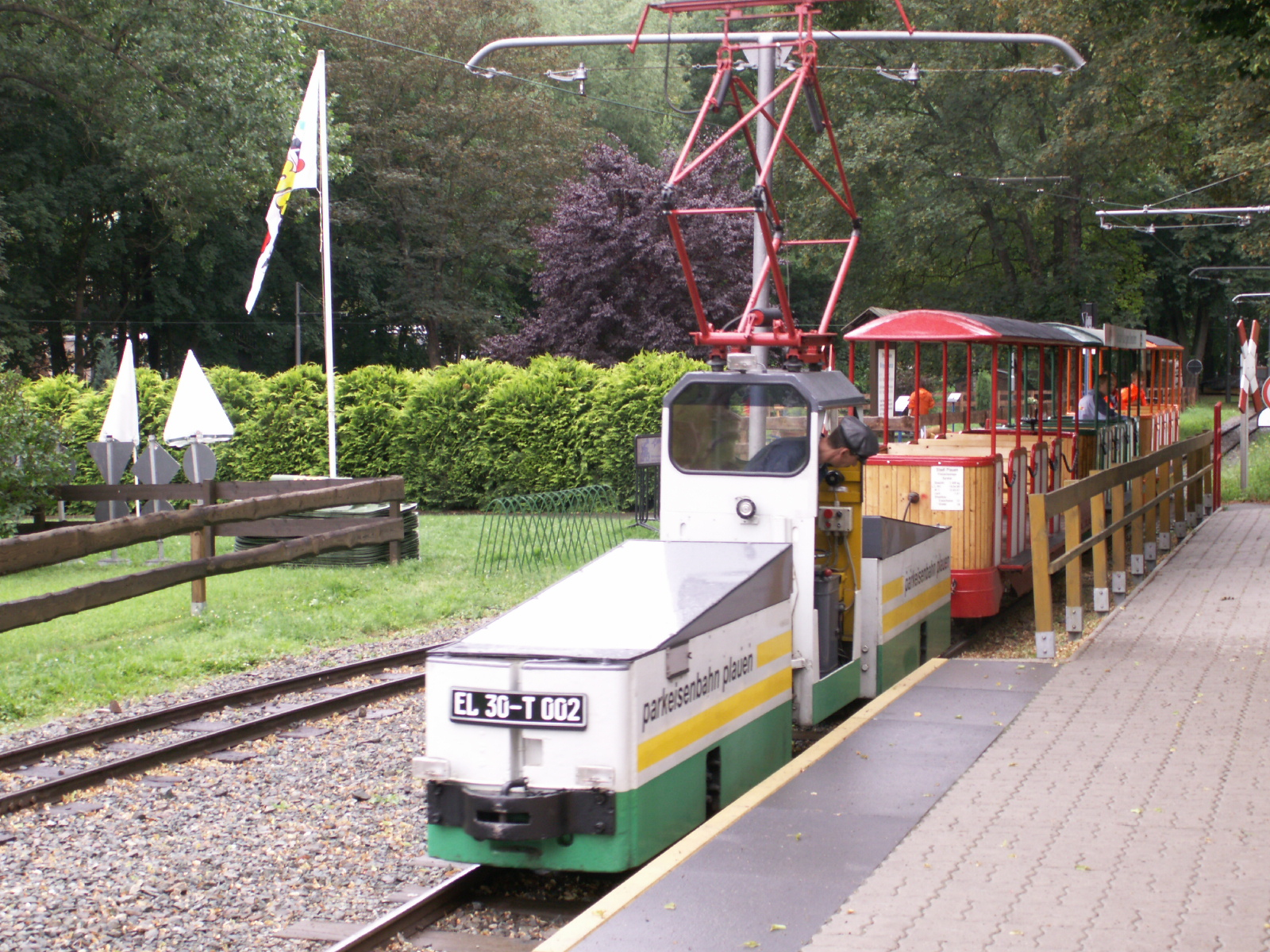 Eine Lok der Baureihe EL 30 Tandem vor dem Bahnhof Hainstraße der Parkeisenbahn Plauen.